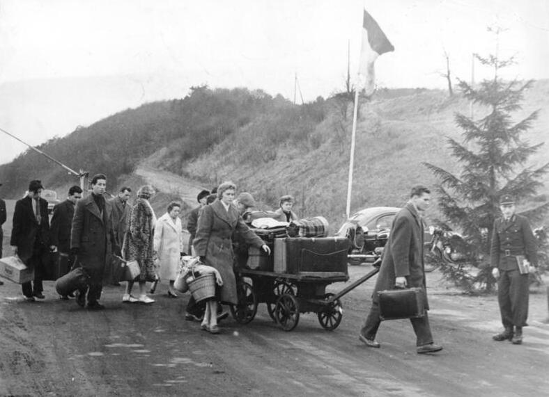 Wartha, Übersiedler auf dem Weg zur Aufnahmestelle Zentralbild / Wittig 22.12.1958 Strom der Übersiedler und Rückkehrer hält unvermindert an UBz: Übersiedler und Rückkehrer, die eben mit dem Zug aus der Westzone gekommen sind, werden von Angestellten der AZKW in Wartha vom Bahnhof zur Aufnahmestelle gebracht.